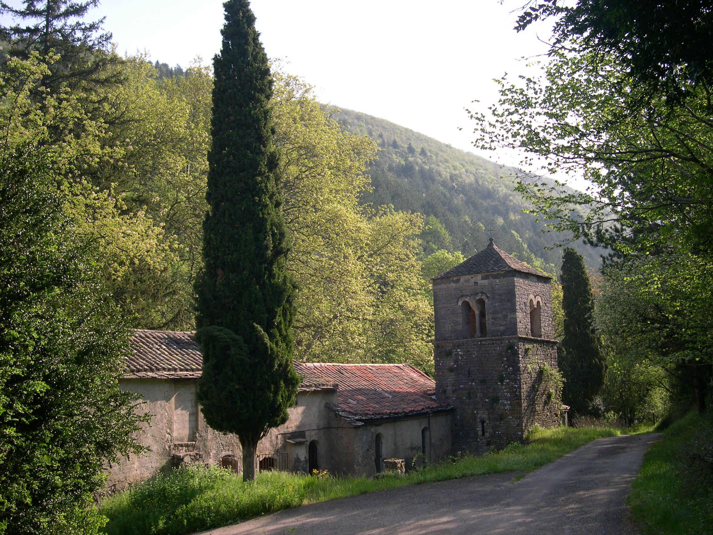 Lunas (Hérault) - église Notre-Dame de Nize.